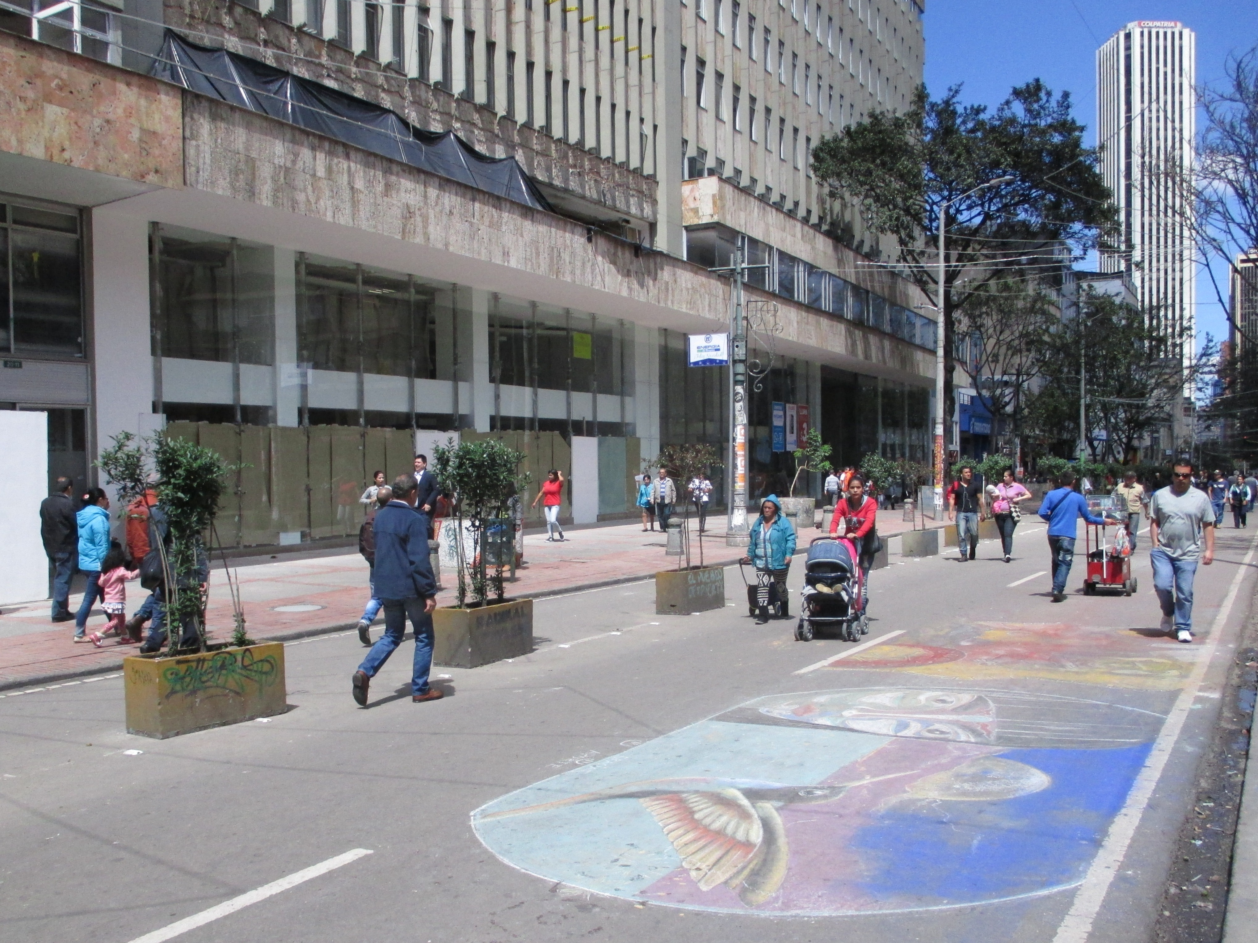 Чӑвашла: Bogotá